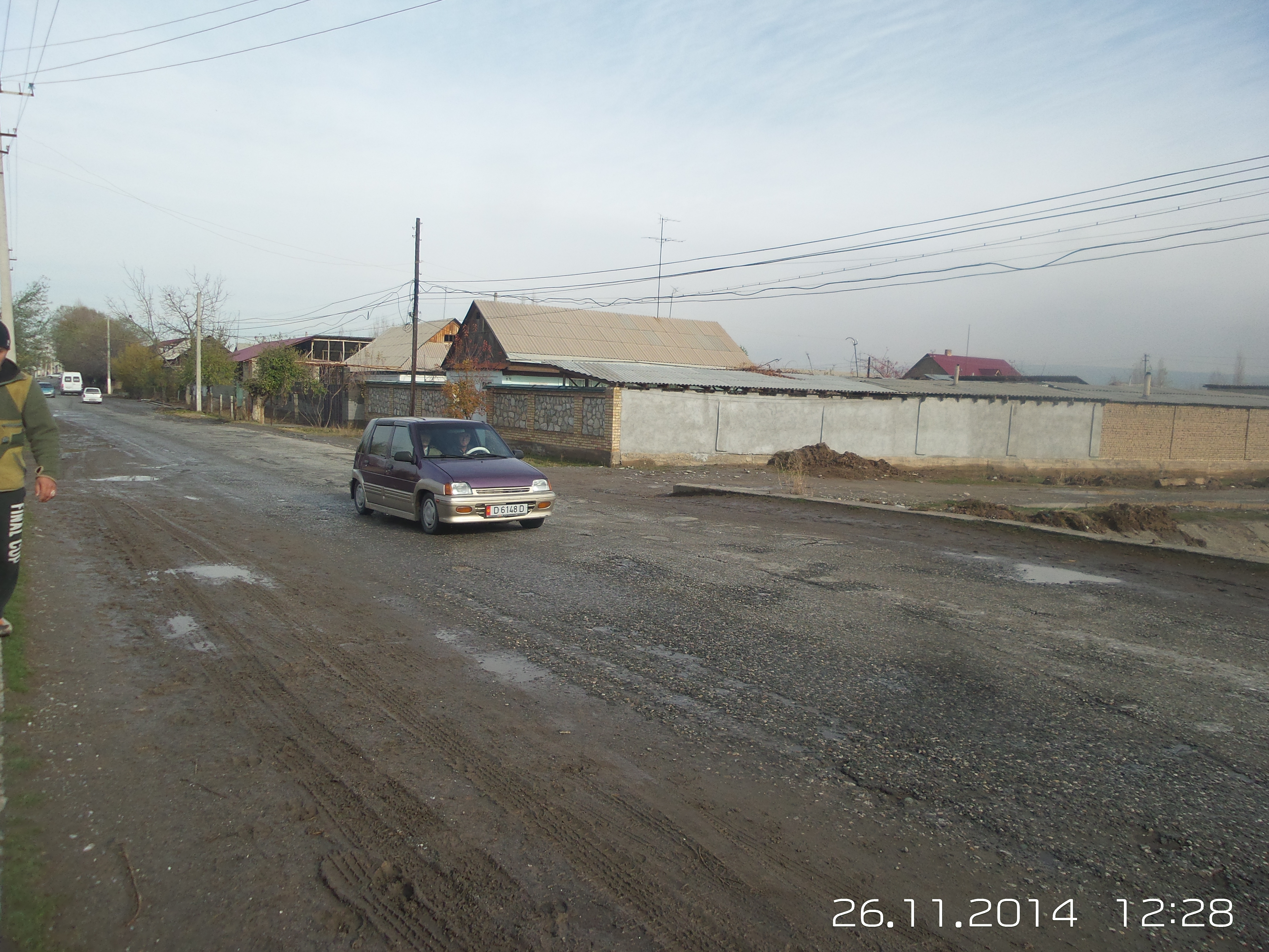 Домар